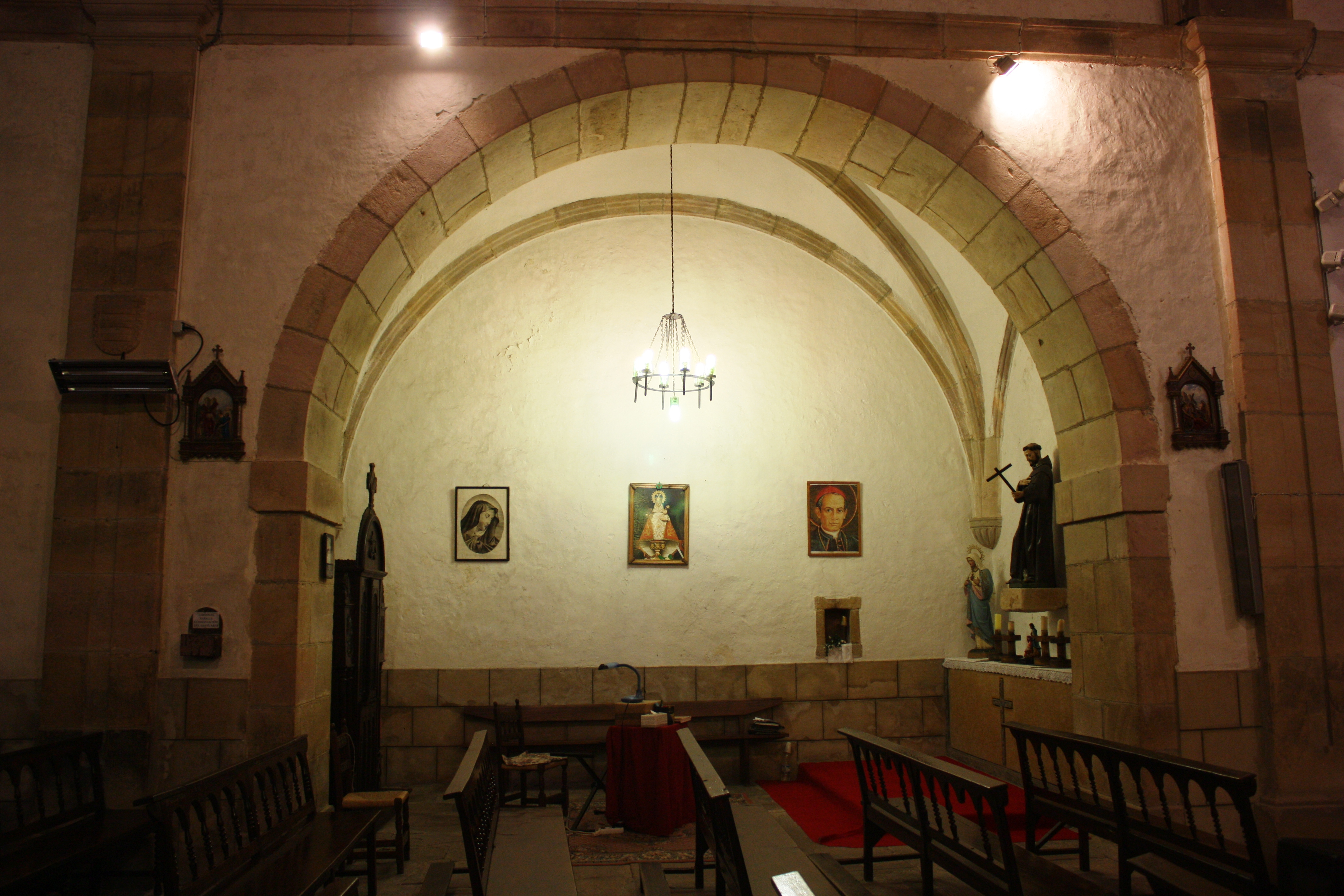 Santuario de Contrueces